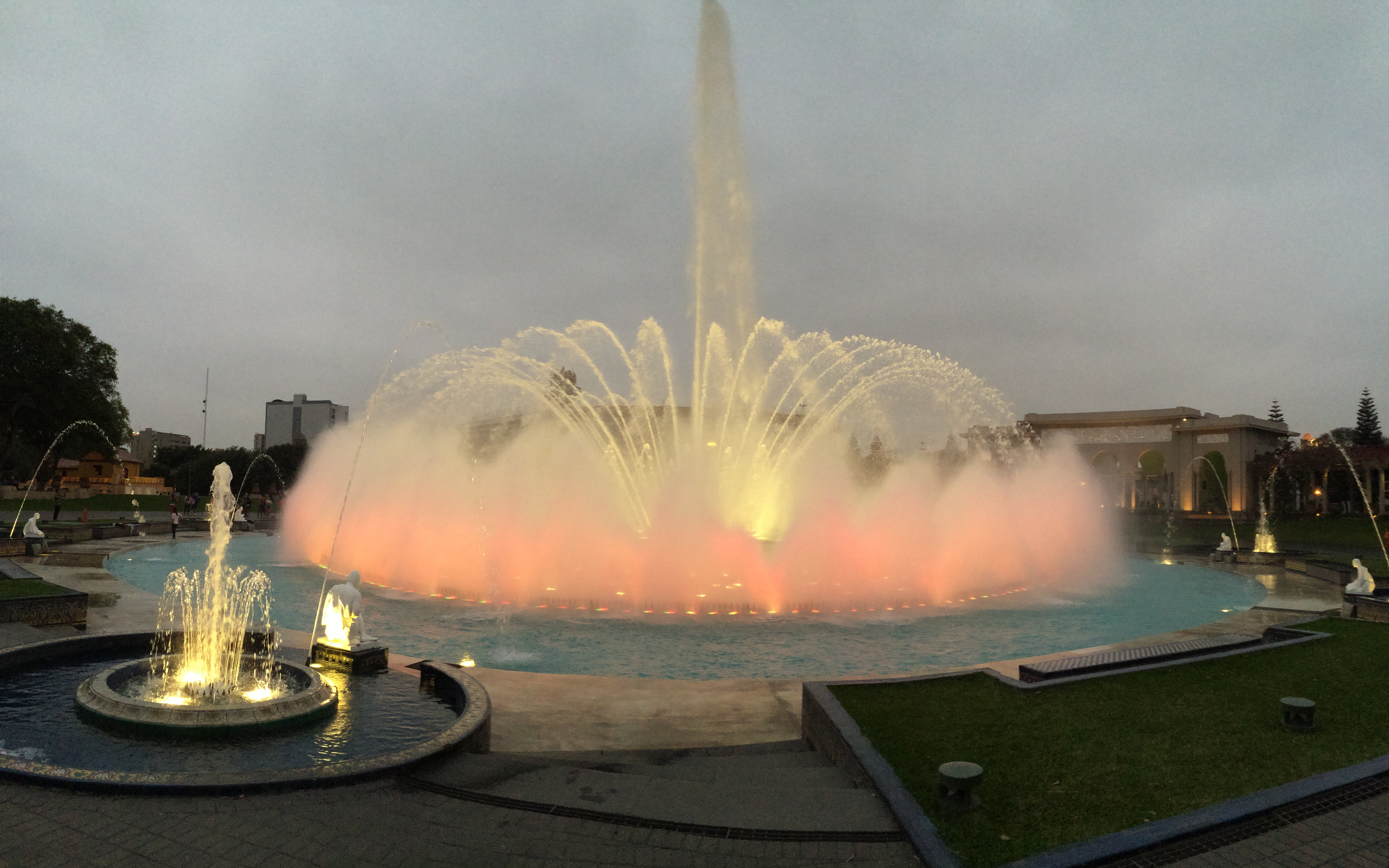 Parque de La Reserva, Lima - Peru